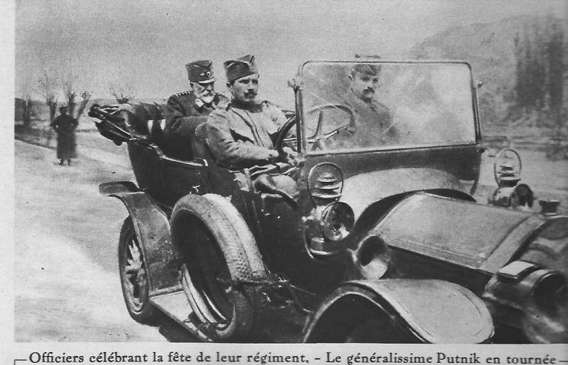 Le général Putnik en tournée